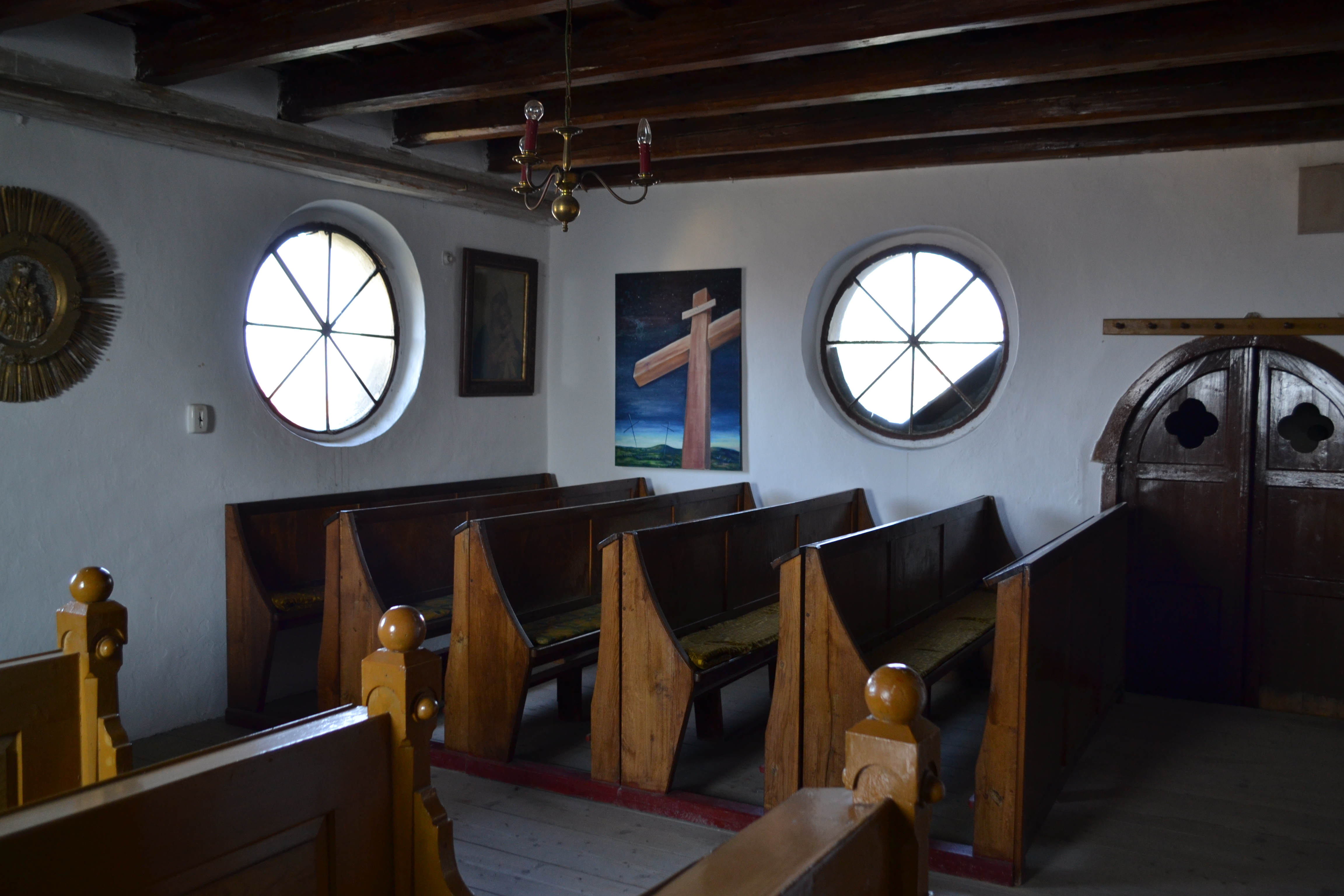 Tribuna nad kaplí sv. Anny v kostele Nejsvětější Trojice (Raduň, Moravskoslezský kraj, Česká republika)